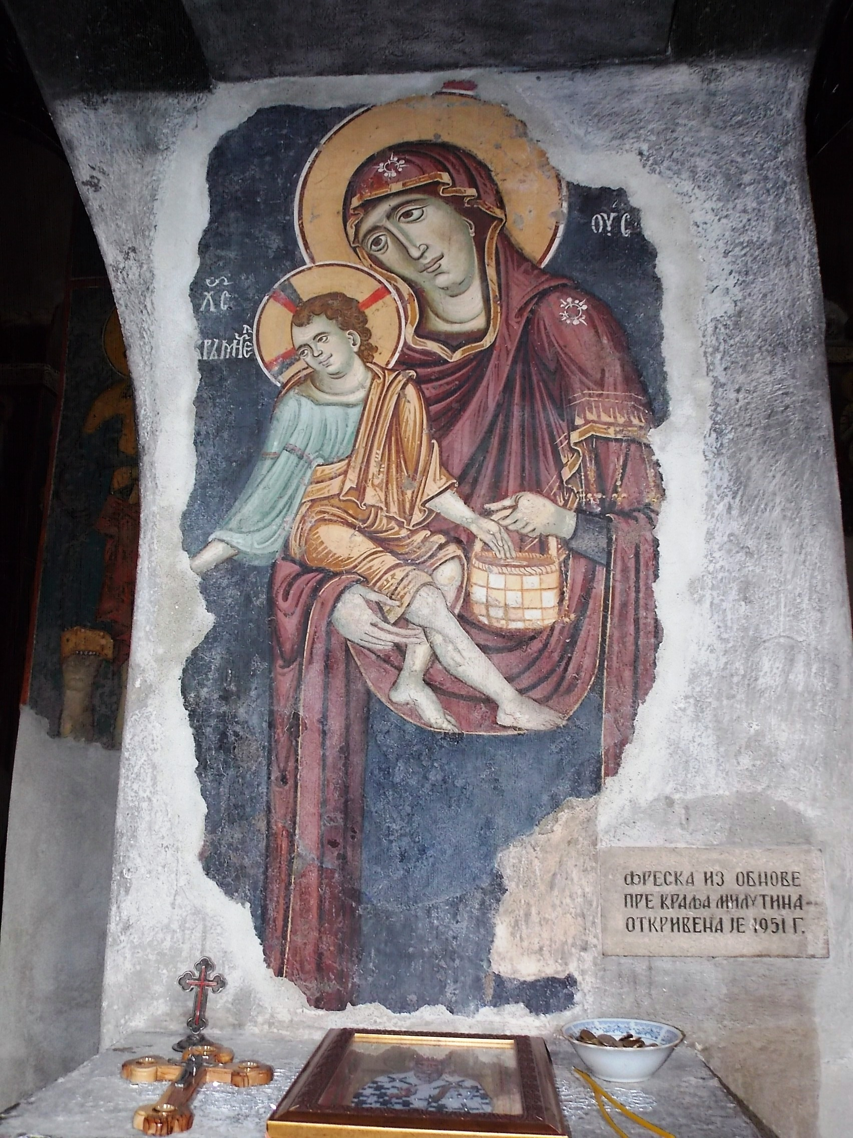 Srpskohrvatski / српскохрватски: Света Богородица Елеуса са Христом крмитељем(хранитељем верних) из 13. века.